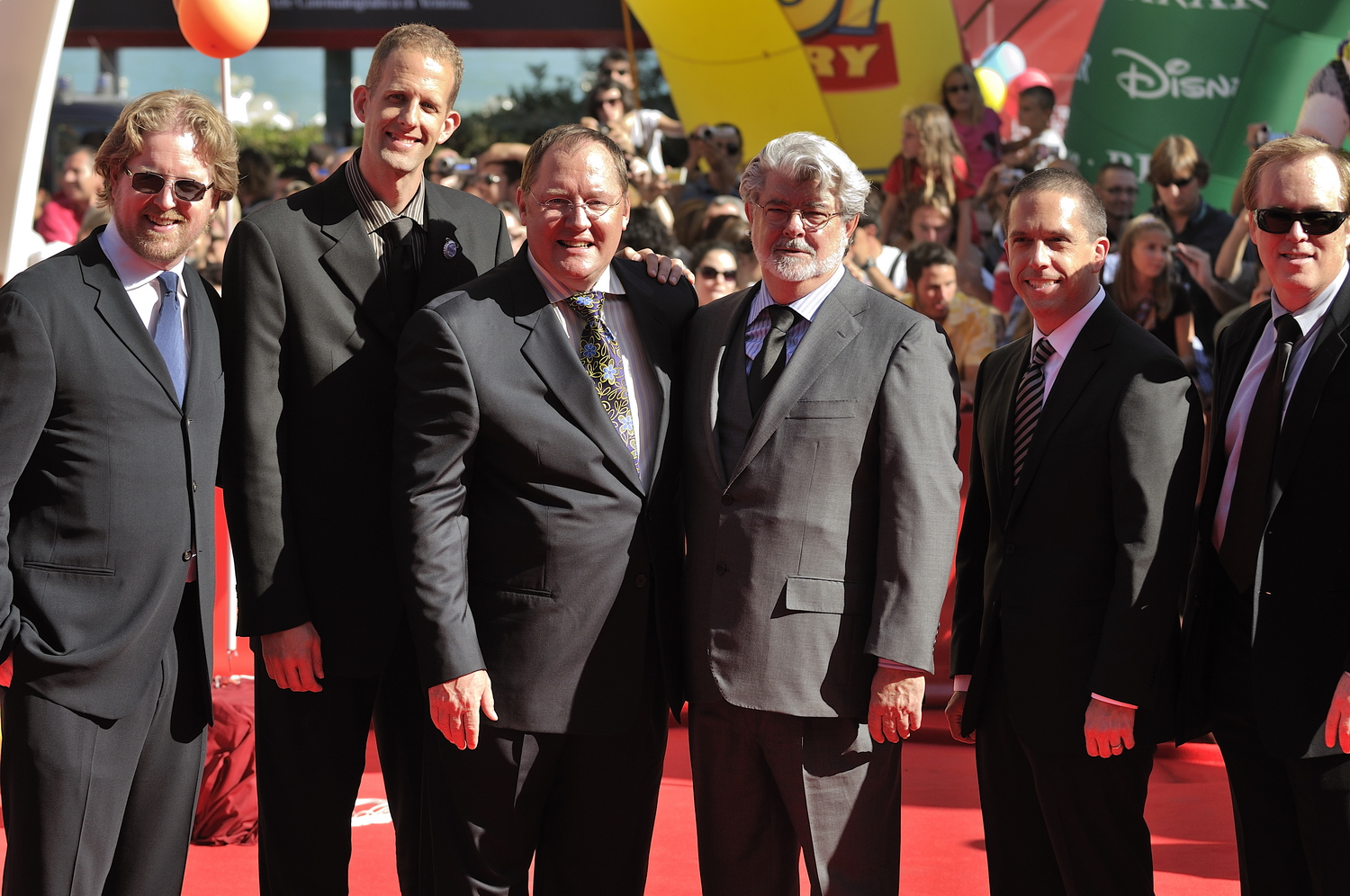 66ème Festival du Cinéma de Venise (Mostra), 5ème jour (06/09/2009) George Lucas et les réalisateurs de Pixar reçoivent un Lion d'Or pour l'ensemble de leur carrière : John Lasseter (Toy Story, 1001 Pattes, Cars...), Brad Bird (Les Indestructibles, Ratatouille), Pete Docter (Monstres et Cie, Là-haut), Andrew Stanton (Le Monde de Nemo, WALL•E) et Lee Unkrich (Toy Story 2, Monstres et Cie, Le Monde de Nemo)